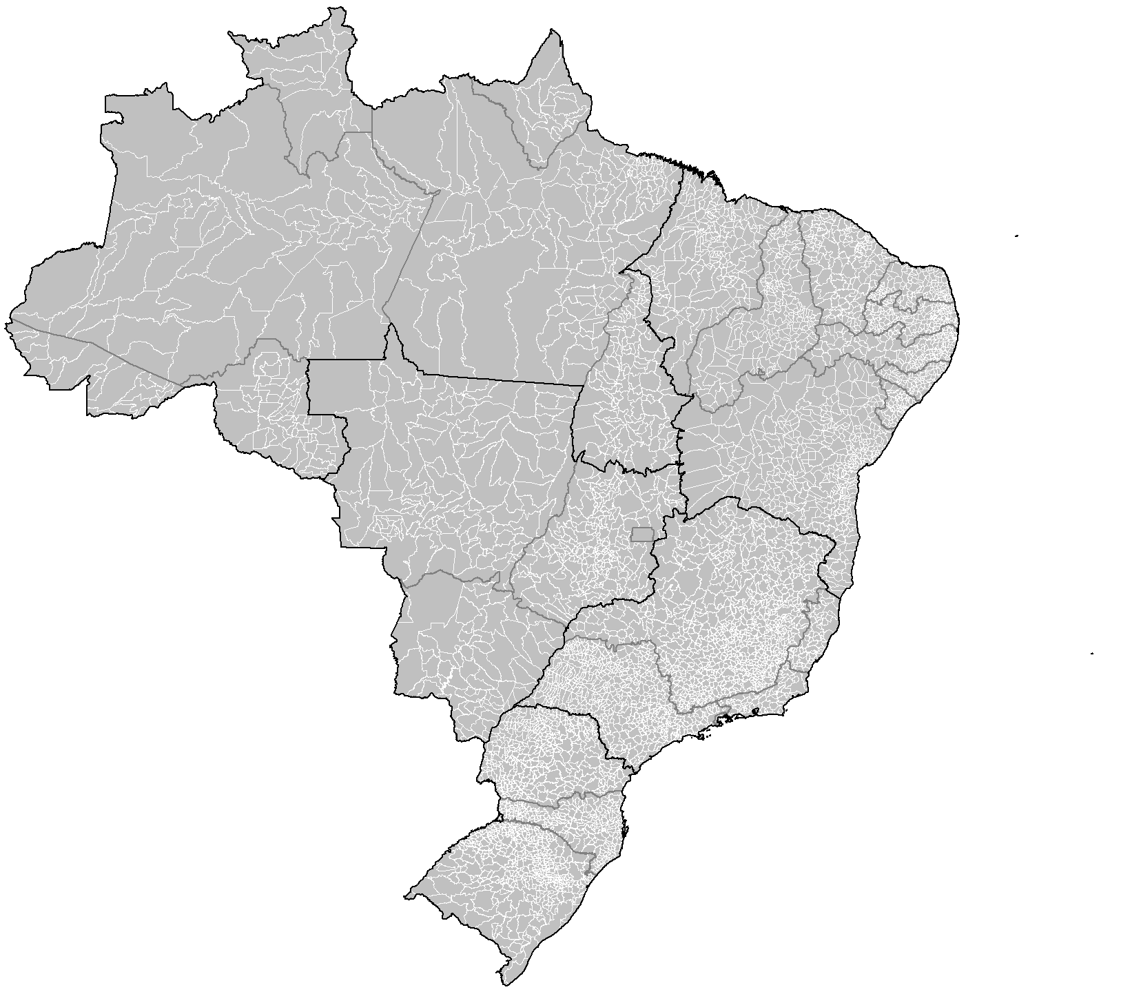 Map of the municipalities of Brazil.